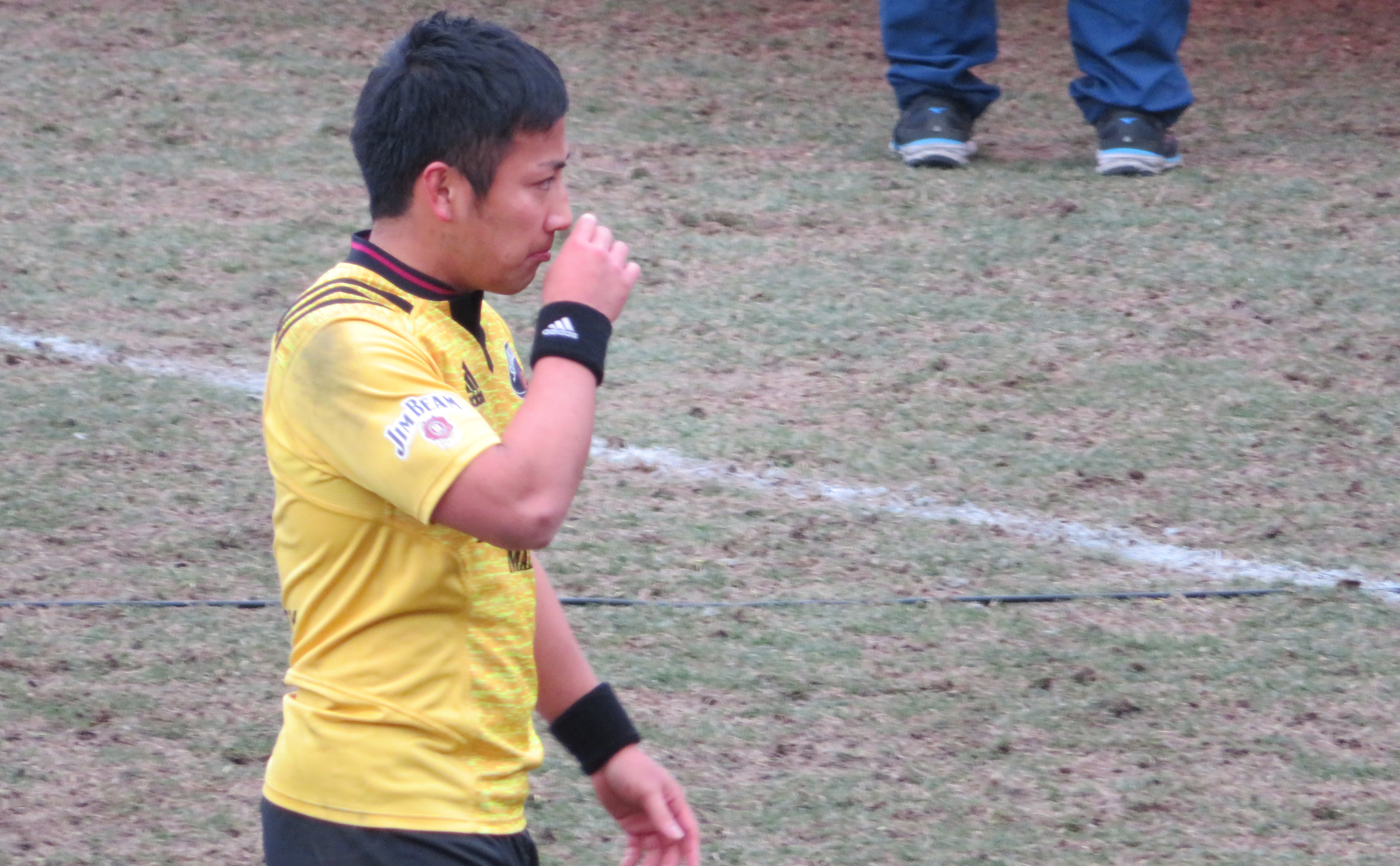 流大選手（サントリーサンゴリアス所属。 日本選手権決勝での勝利後、準優勝チームの表彰を見ながら優勝の表彰式を待っている場面